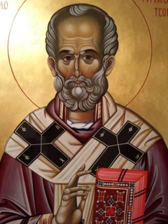 Sv Nikola